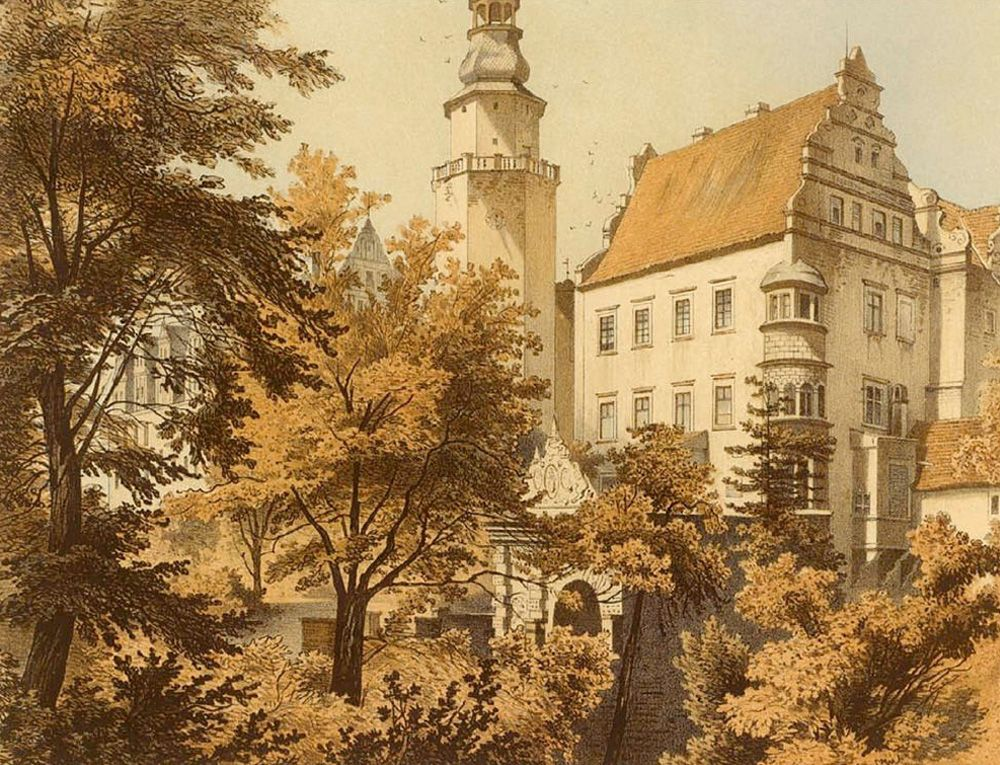 Schloss Oels in Niederschlesien um 1870